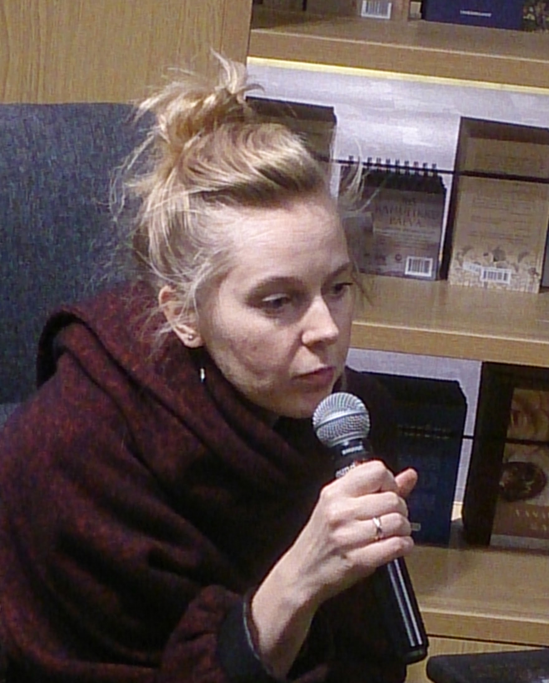 Britt Samoson, eesti moekunstnik ja stilist.